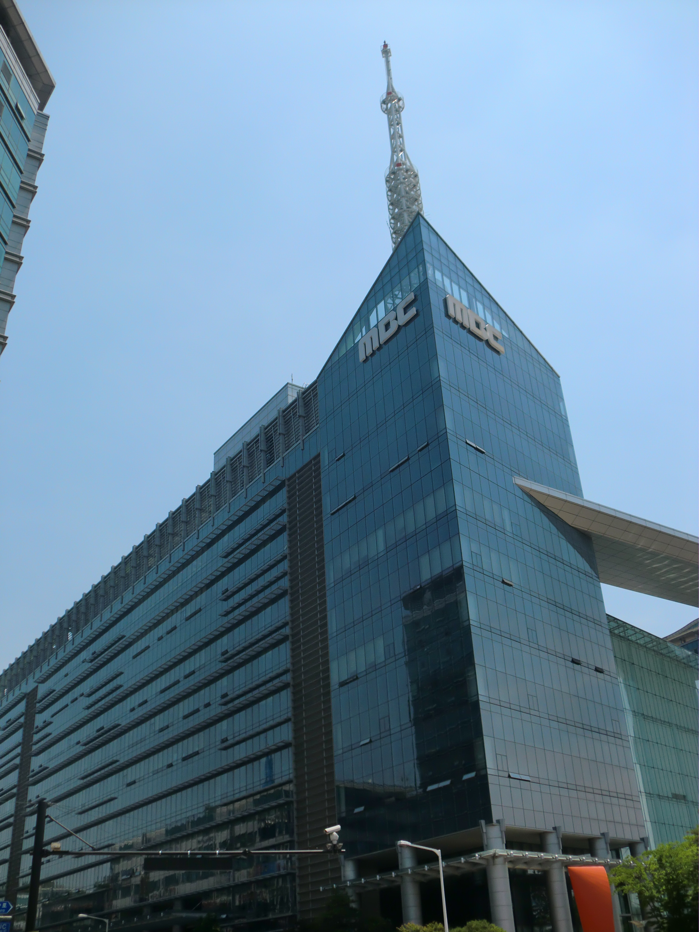 경기도 고양시에 있는 MBC일선드림센터